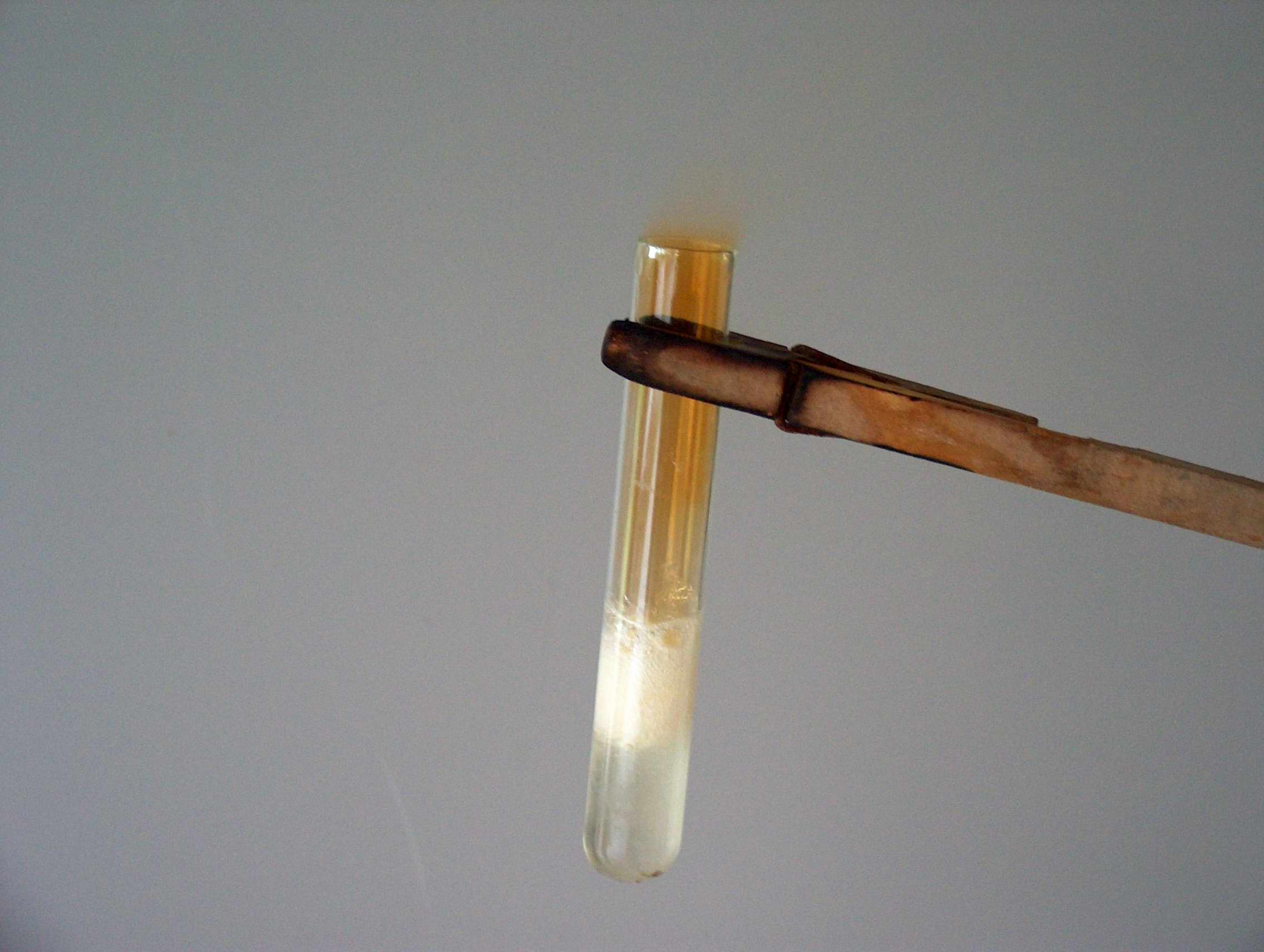 Acido nitrico riscaldato con rilascio di biossido d'azoto. Ho creato io questa immagine. --Fabexplosive 20:38, 20 apr 2006 (CEST) Categoria:Immagini di chimica